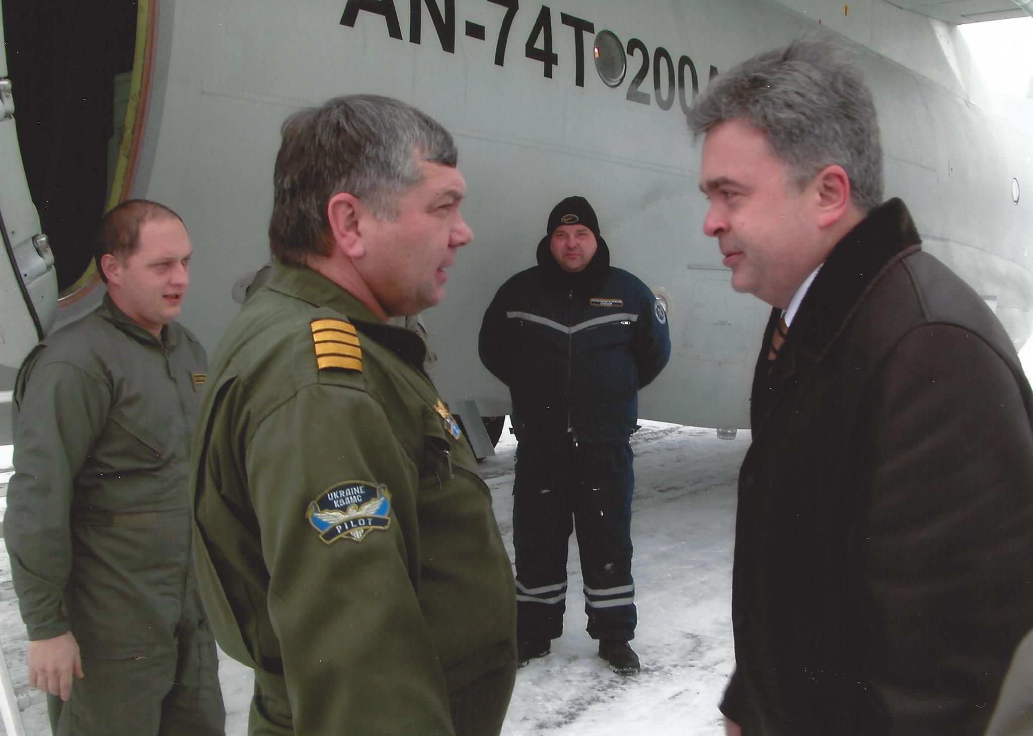 Первый полет АН-74Т-200А (декабрь 2004). На снимке: летчик-испытатель Владимир Самодуров (слева) и Генеральный директор ХГАПП Павел Науменко